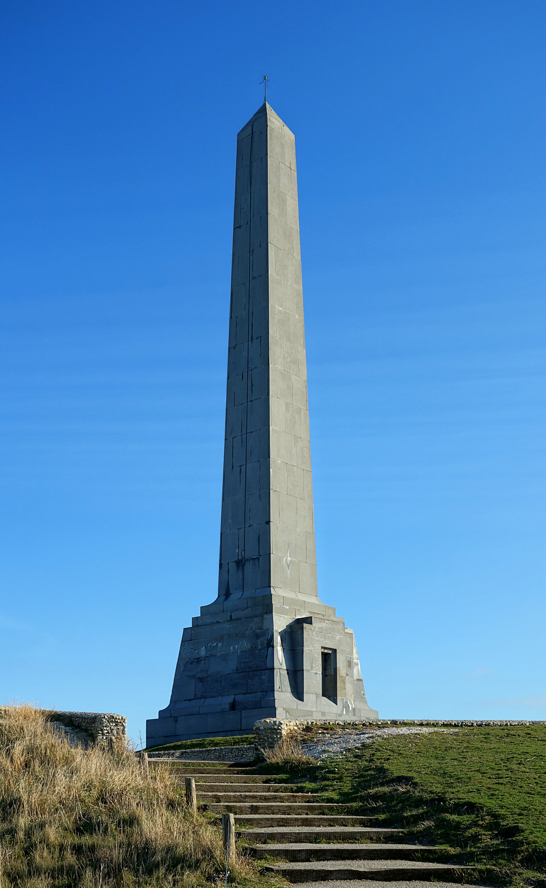 L'obélisque dédié à la Dover Patrol, cap Blanc-Nez (Pas-de-Calais).